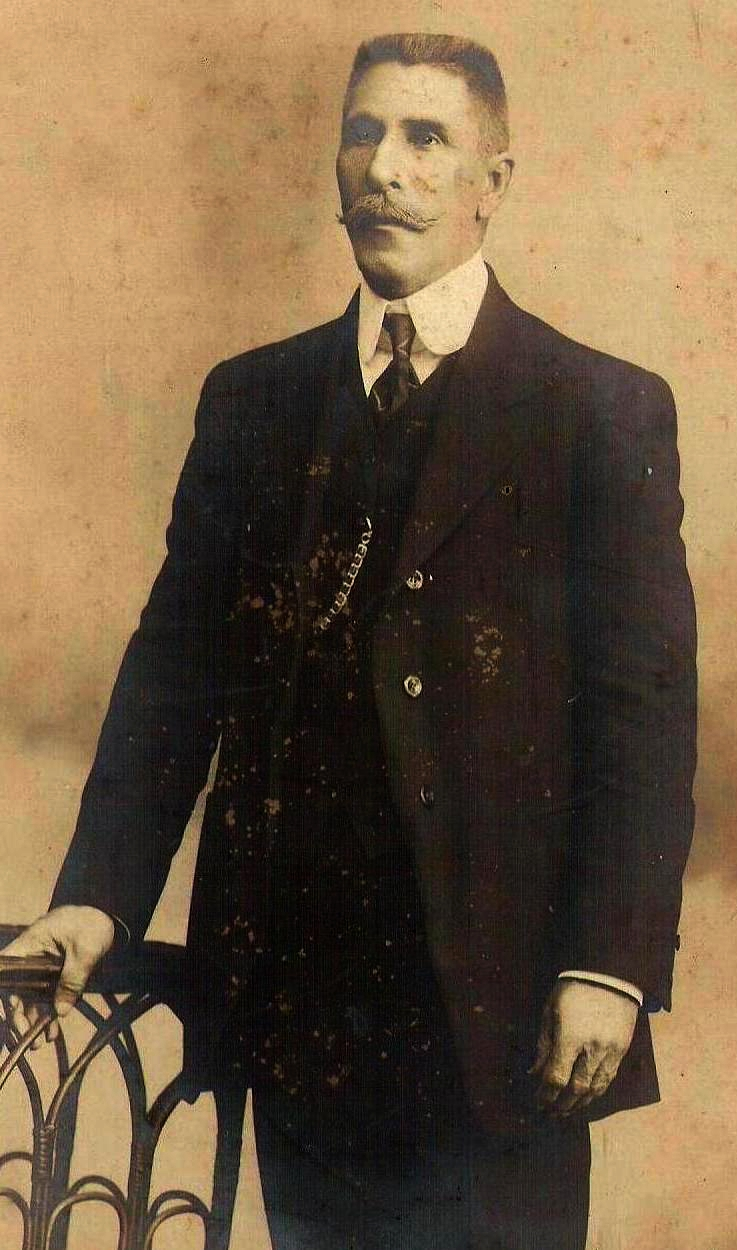 Pessoa trajando terno